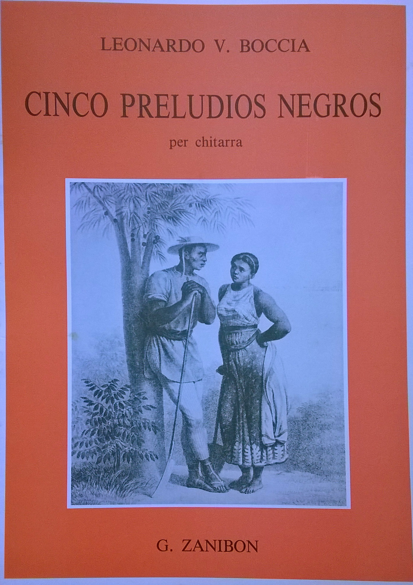 Capa da partitura dos Prelúdios